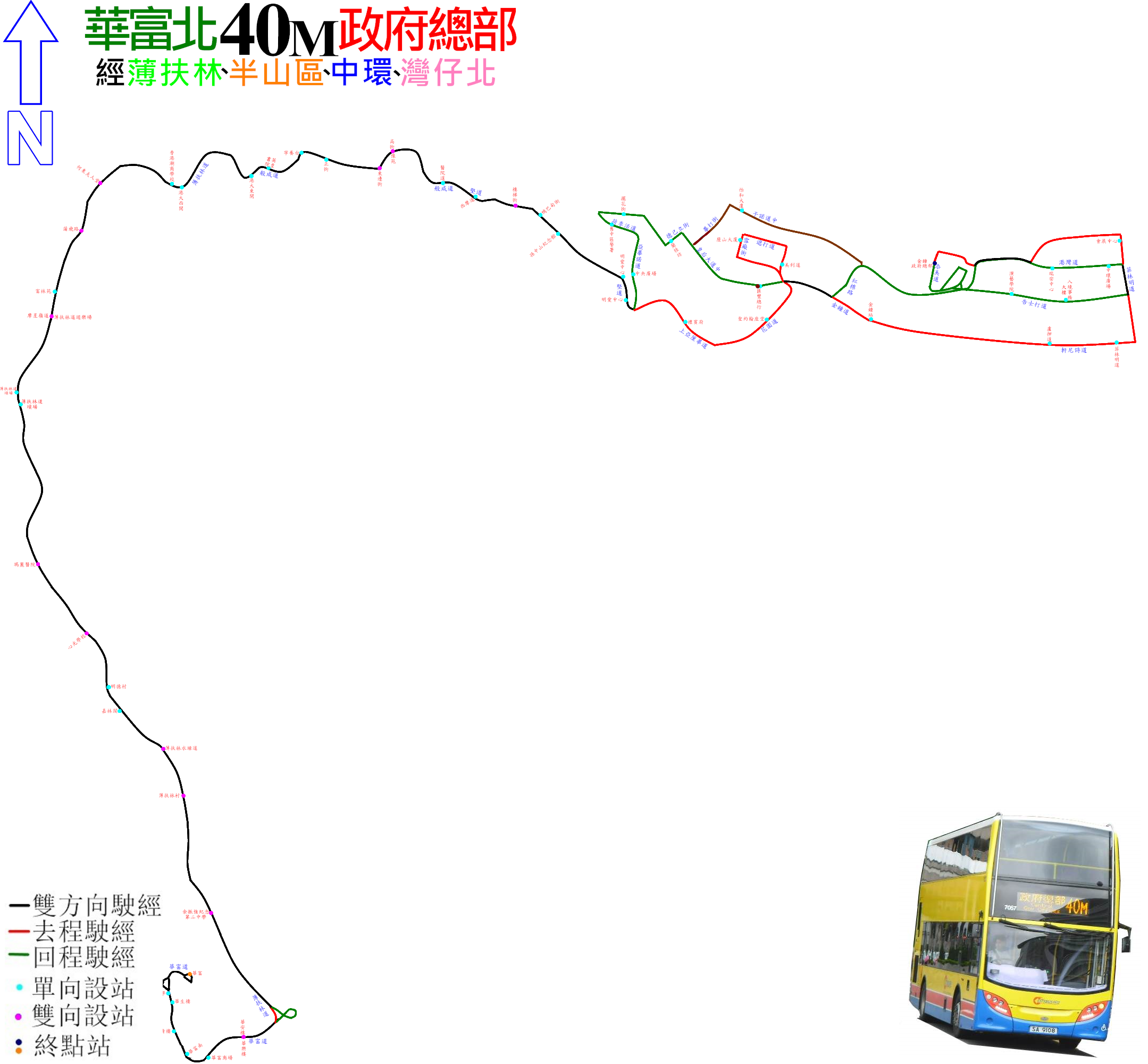 中文（香港）: 城巴40M線的走線圖